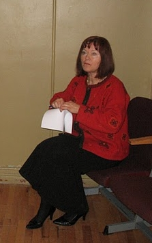 Maret Merisaar Erakonna Eestimaa Rohelised arengu teemalises avatud ruumis